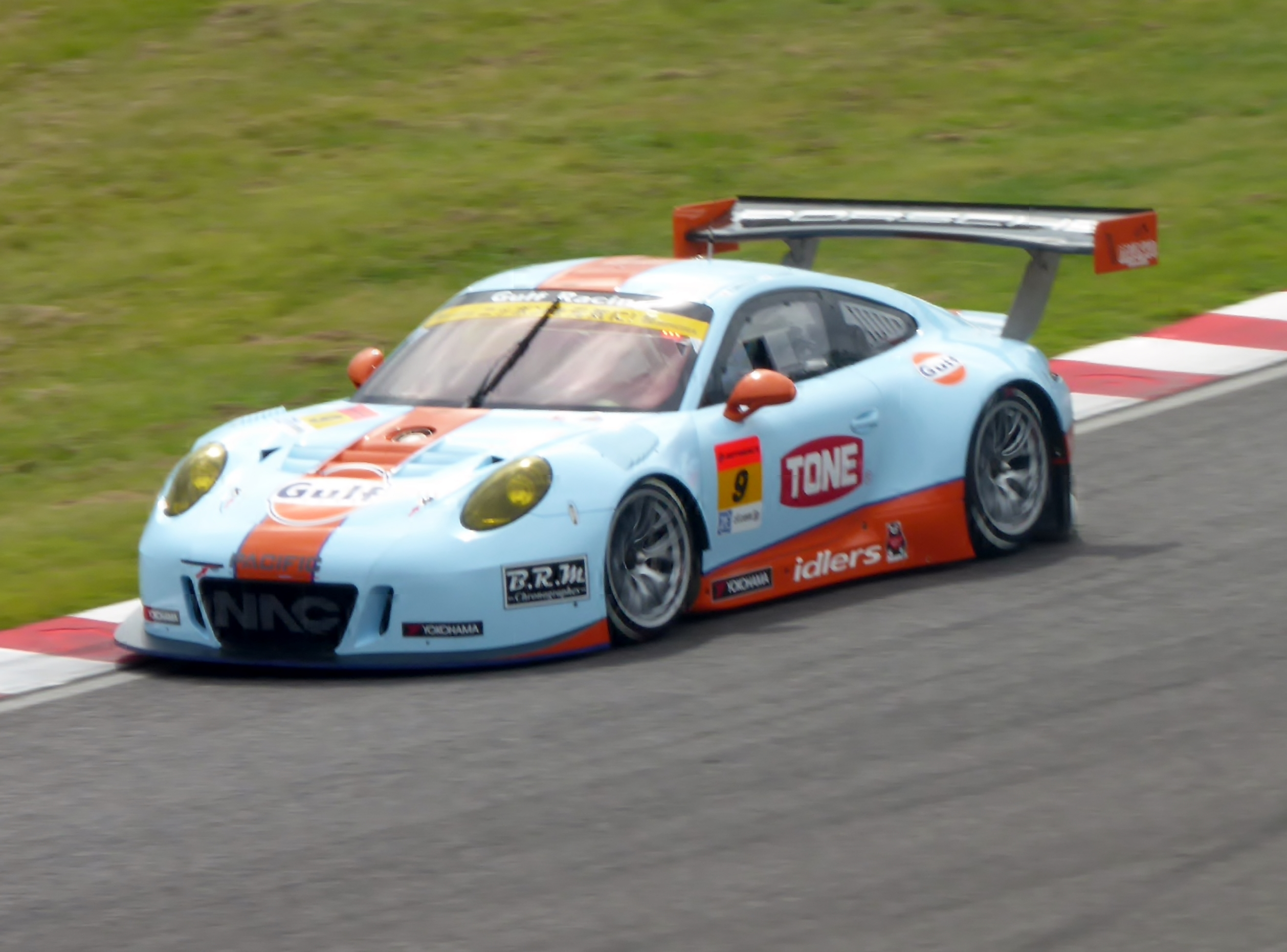 2016年鈴鹿1000㎞における9号車GULF NAC PORSCHE 911を撮影。